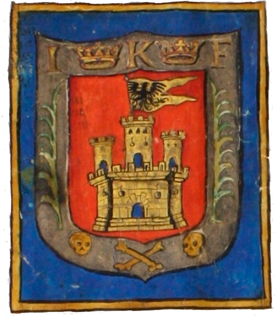 Escudo de Armas concedido a la ciudad novohispana de Tlaxcala en en 1535.